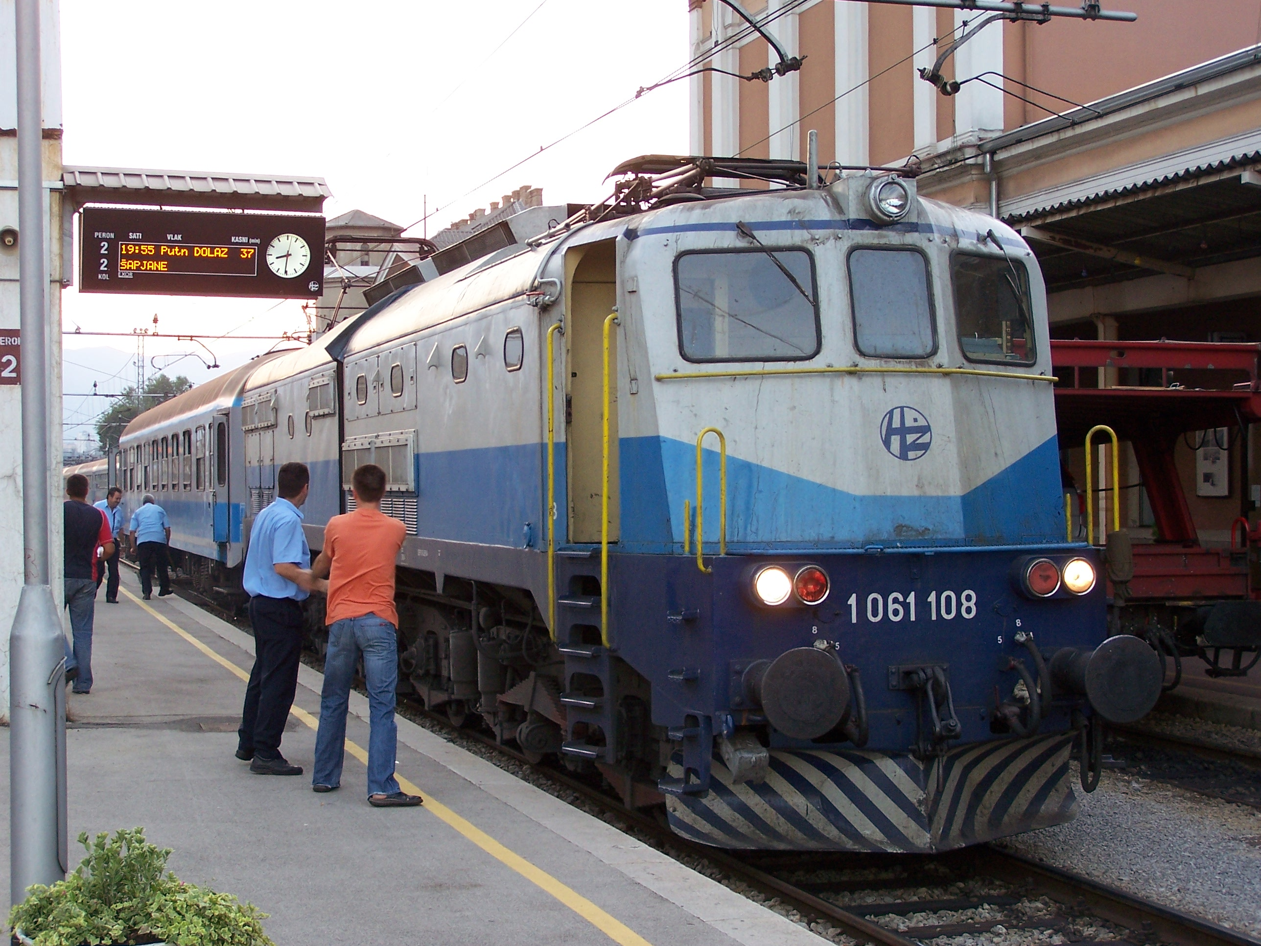 HŽ 1061